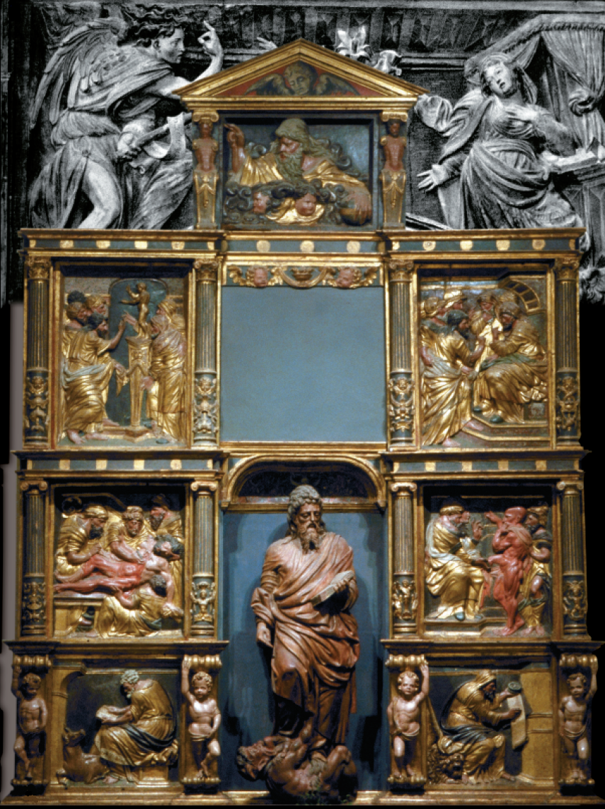 Jasokundeko erretaula nagusia, Bilar